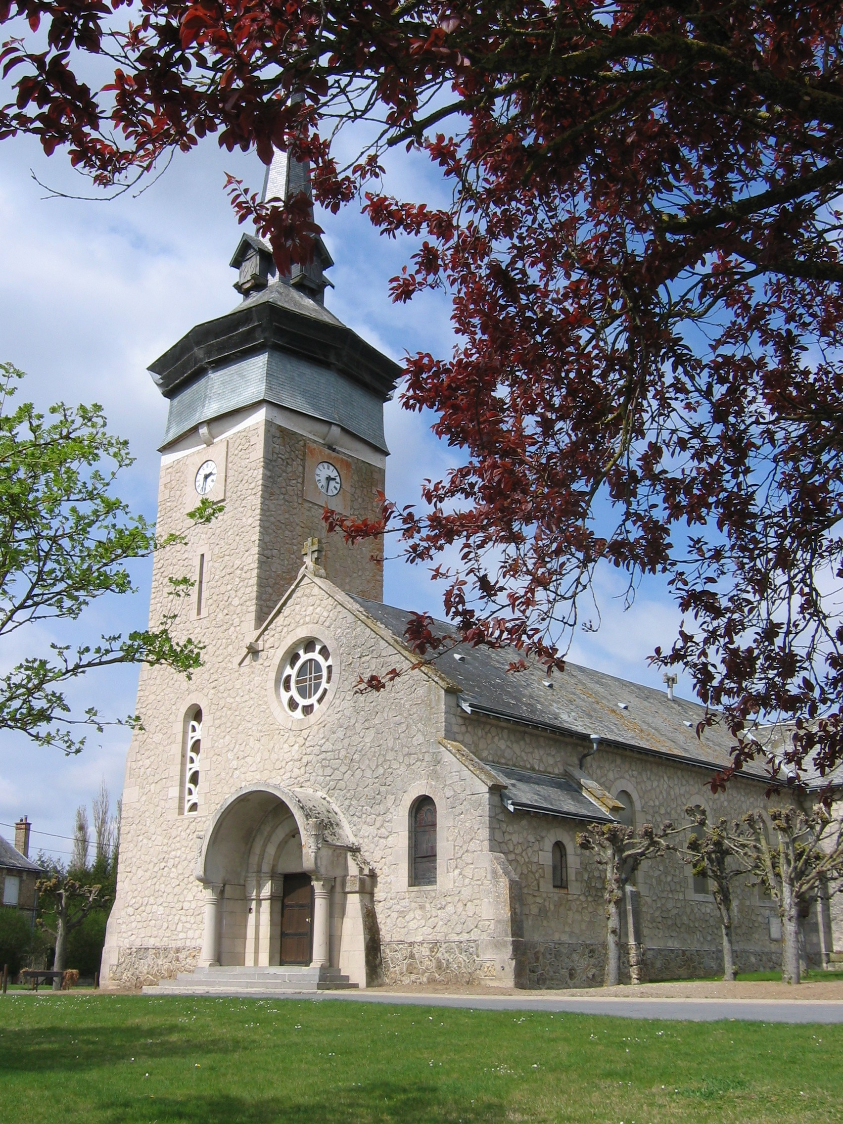 Eglise de Banogne - Banogne-Recouvrance Ardennes France